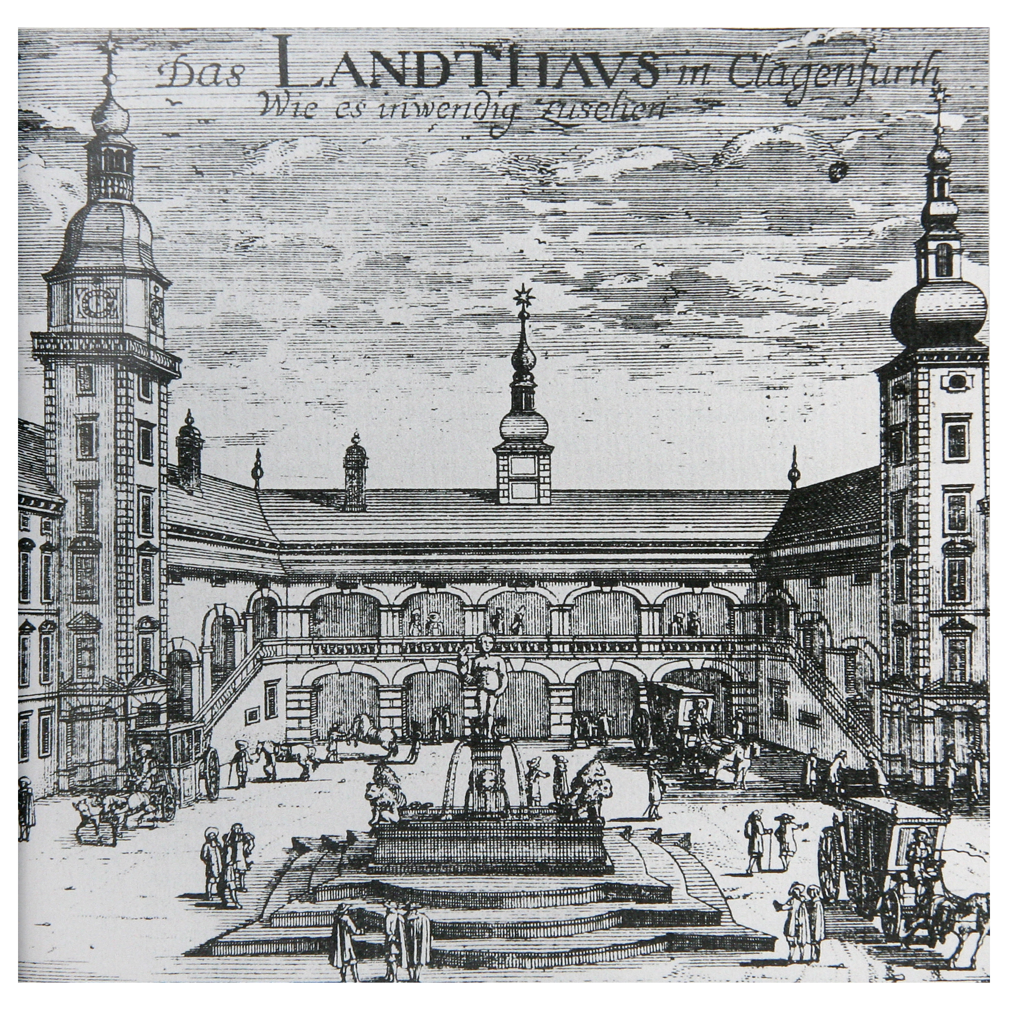 Landhaus in Klagenfurt mit Fortuna-Brunnen